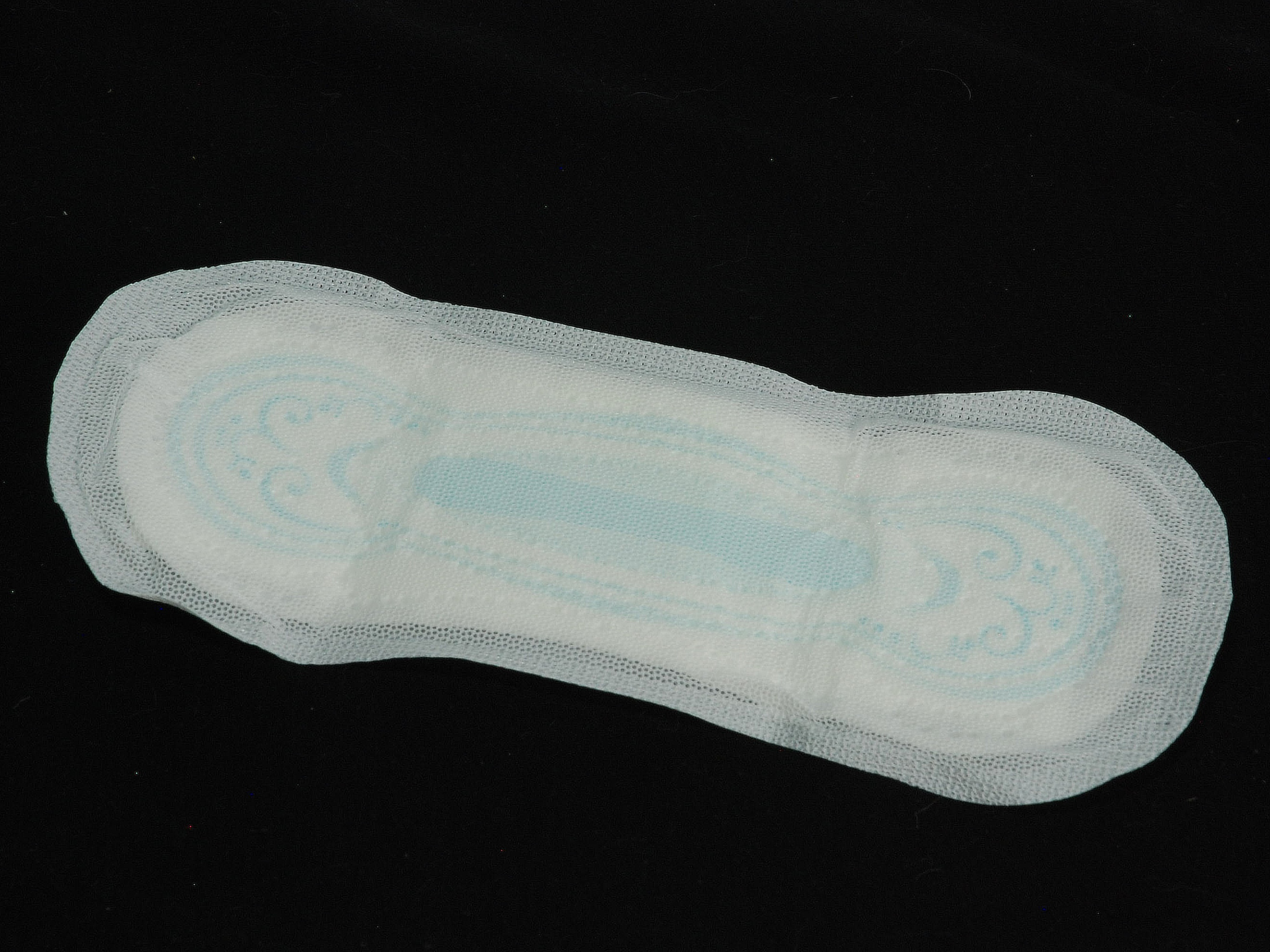 Hygienické vložky